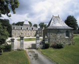 Chateau du Val